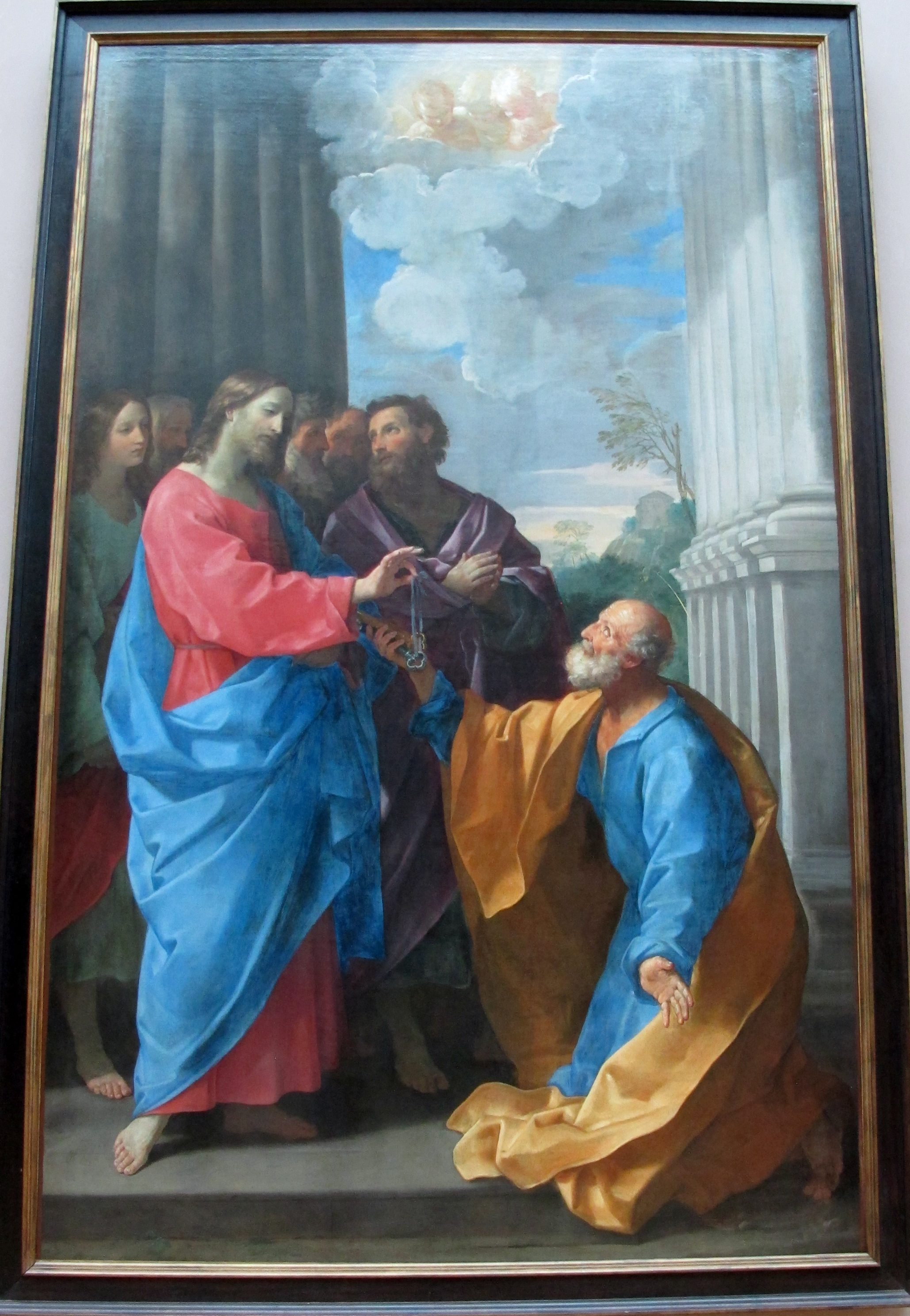 Pittura italiana del XVII secolo al Louvre